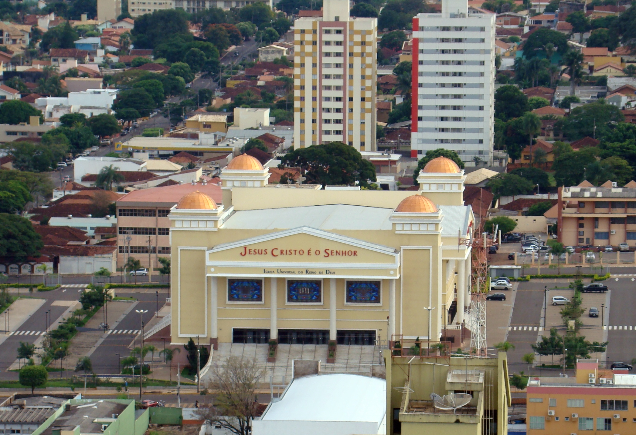 Igreja Universal de Campo Grande